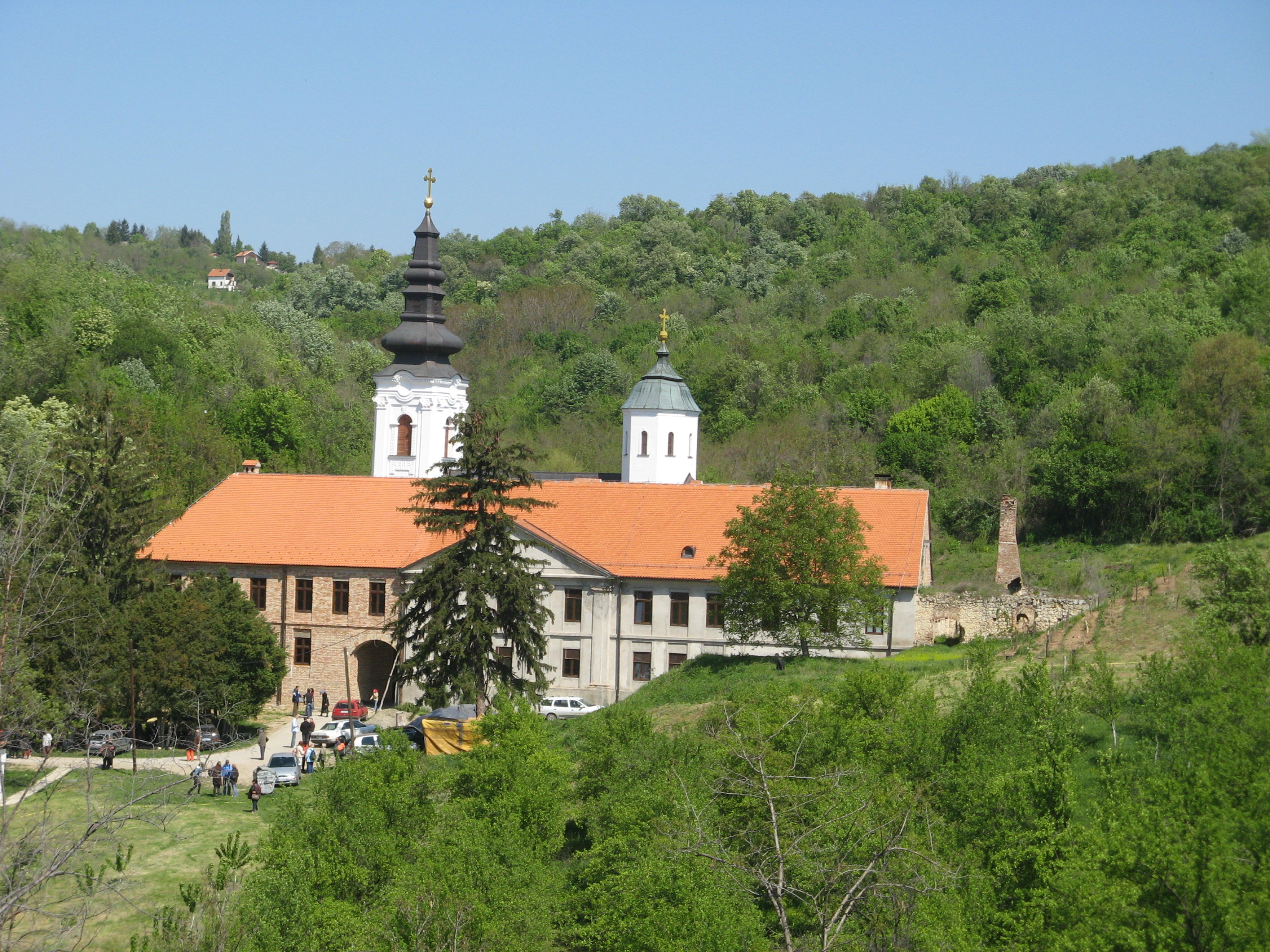 Manastir Kuveždin